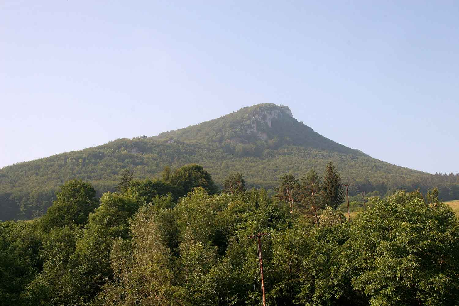 Malý Manín hill - view from village Dolina, Súlovské vrchy, district Povážská Bystrica, Slovakia autor:Prazak Date: 28. 6. 2006